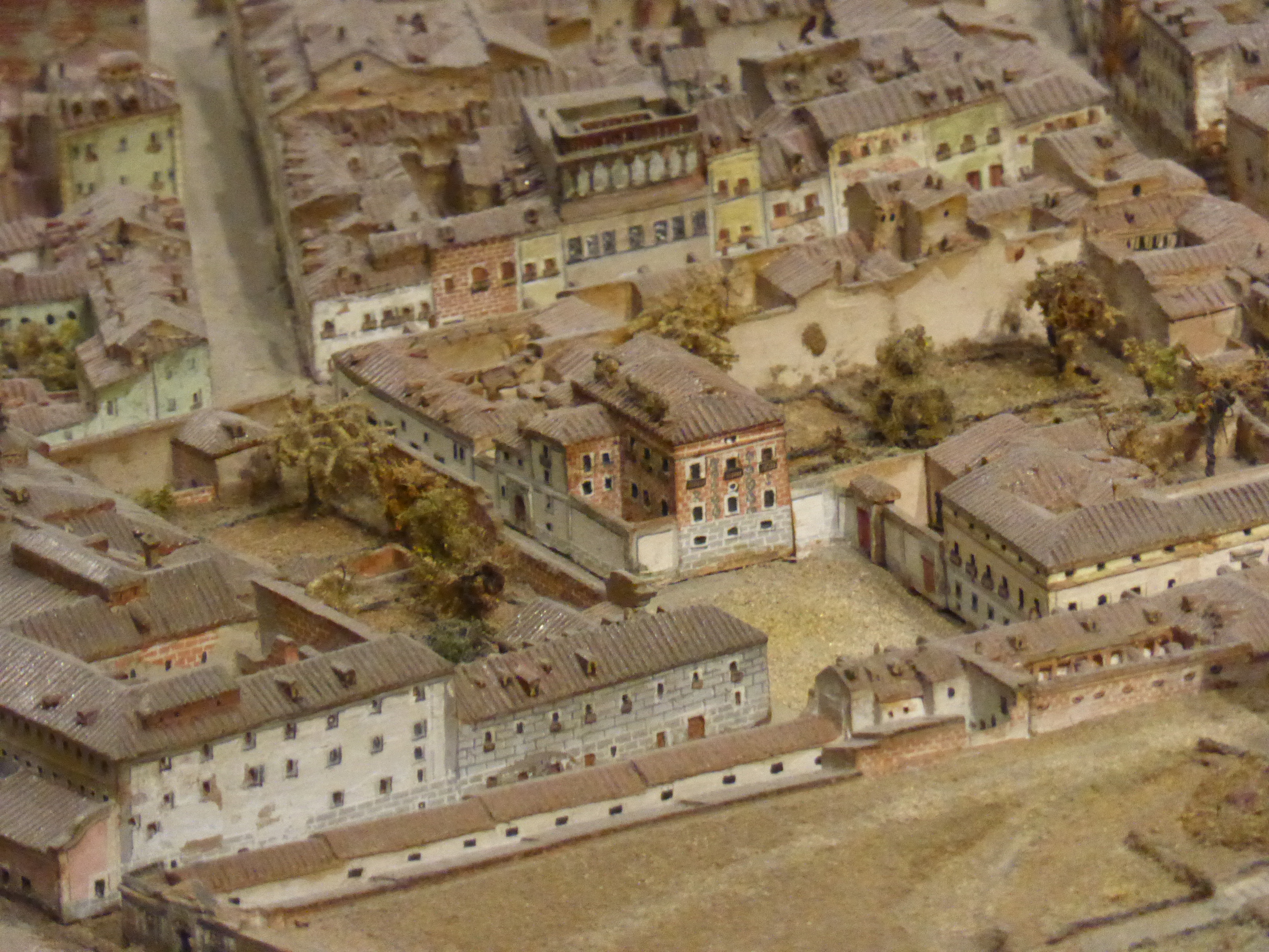 En el centro de la imagen se distingue la Casa de las Siete Chimeneas, junto a la Plaza del Rey, en el antiguo "Modelo de Madrid", de León Gil de Palacio. Esta maqueta se empezó a construir en 1828 y se terminó en 1830. En el siglo XIX esta maqueta estuvo en el Museo de Artillería, en la primera sala. Actualmente se conserva en el "Museo de Historia de Madrid" (antes llamado Museo Municipal de Madrid).